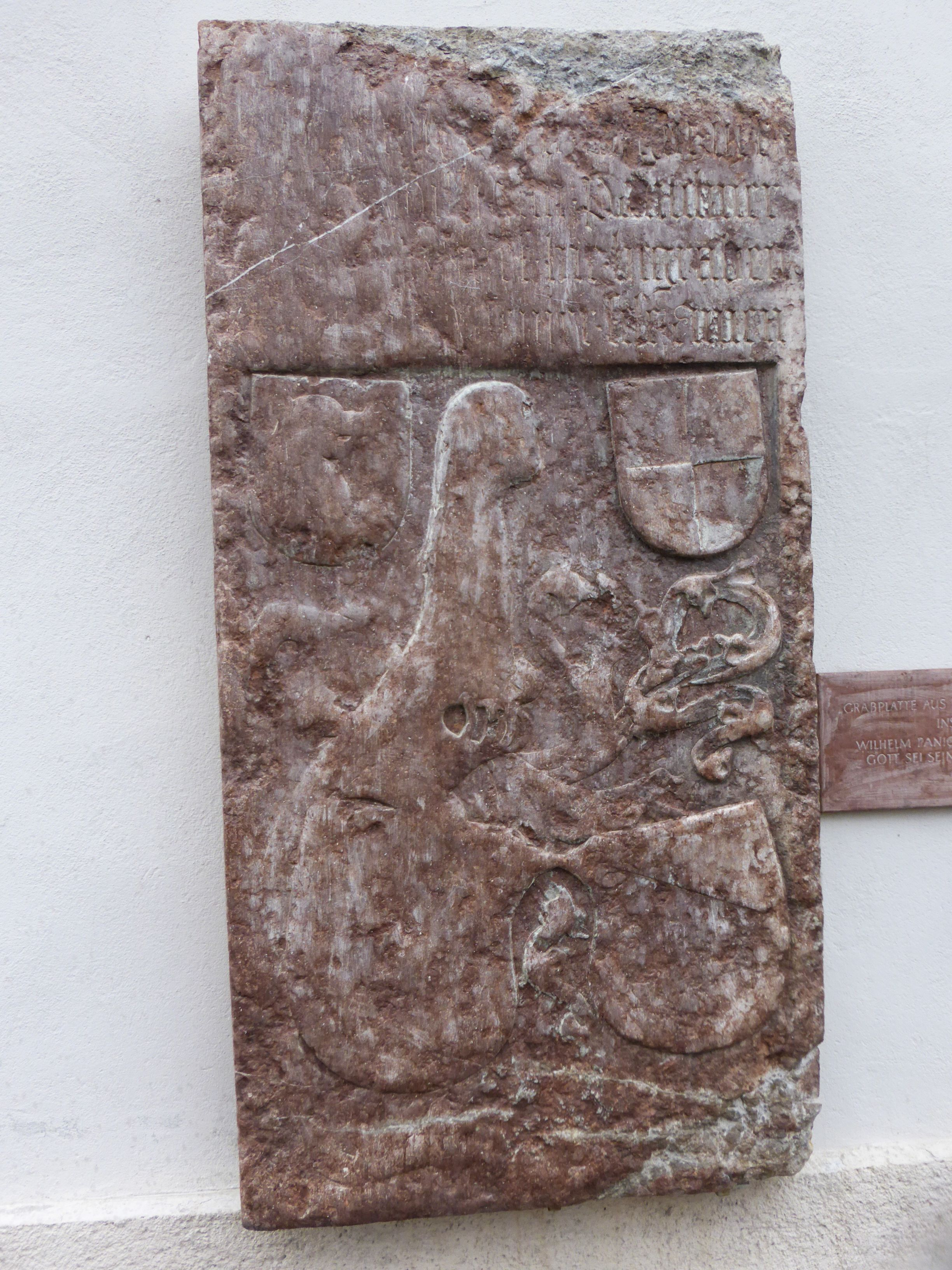 Kath. Pfarrkirche hl. Maria und Pankraz